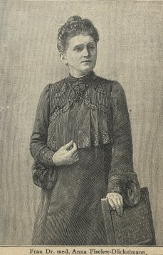 Porträt von Anna Fischer-Dückelmann